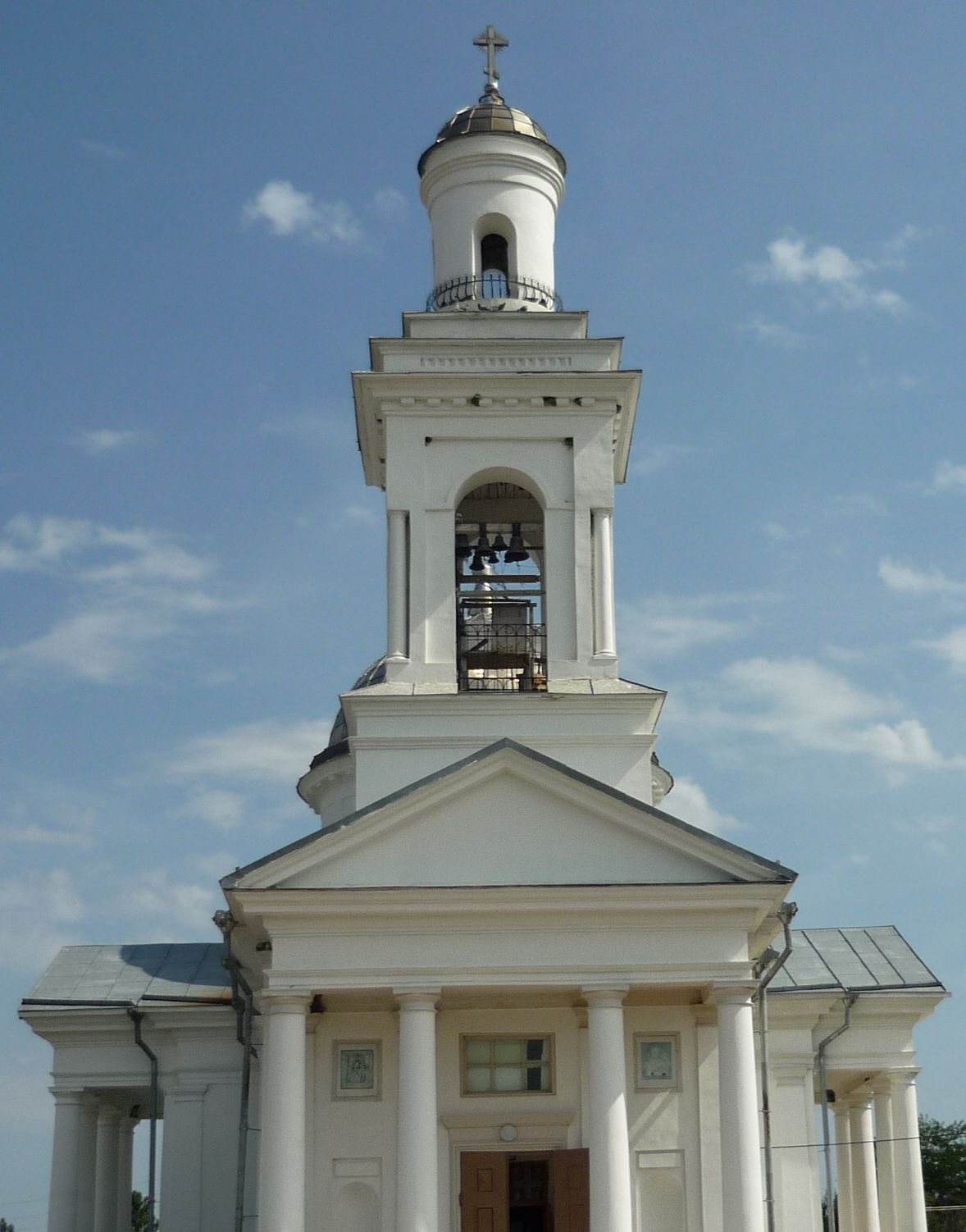 Церковь в селе Насыпное Большая Феодосия